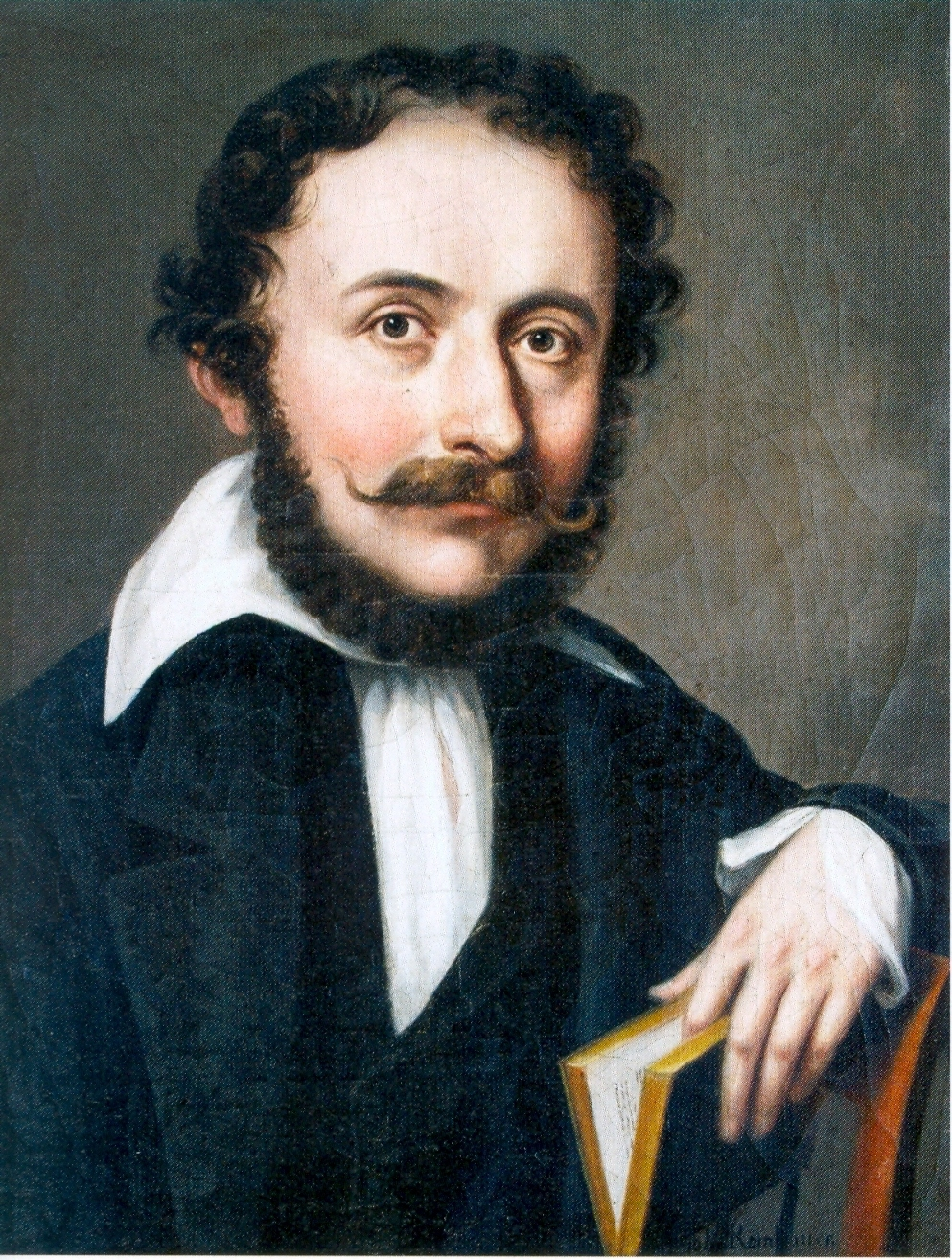 Benczúr József magyar tanár, könyvkereskedő.